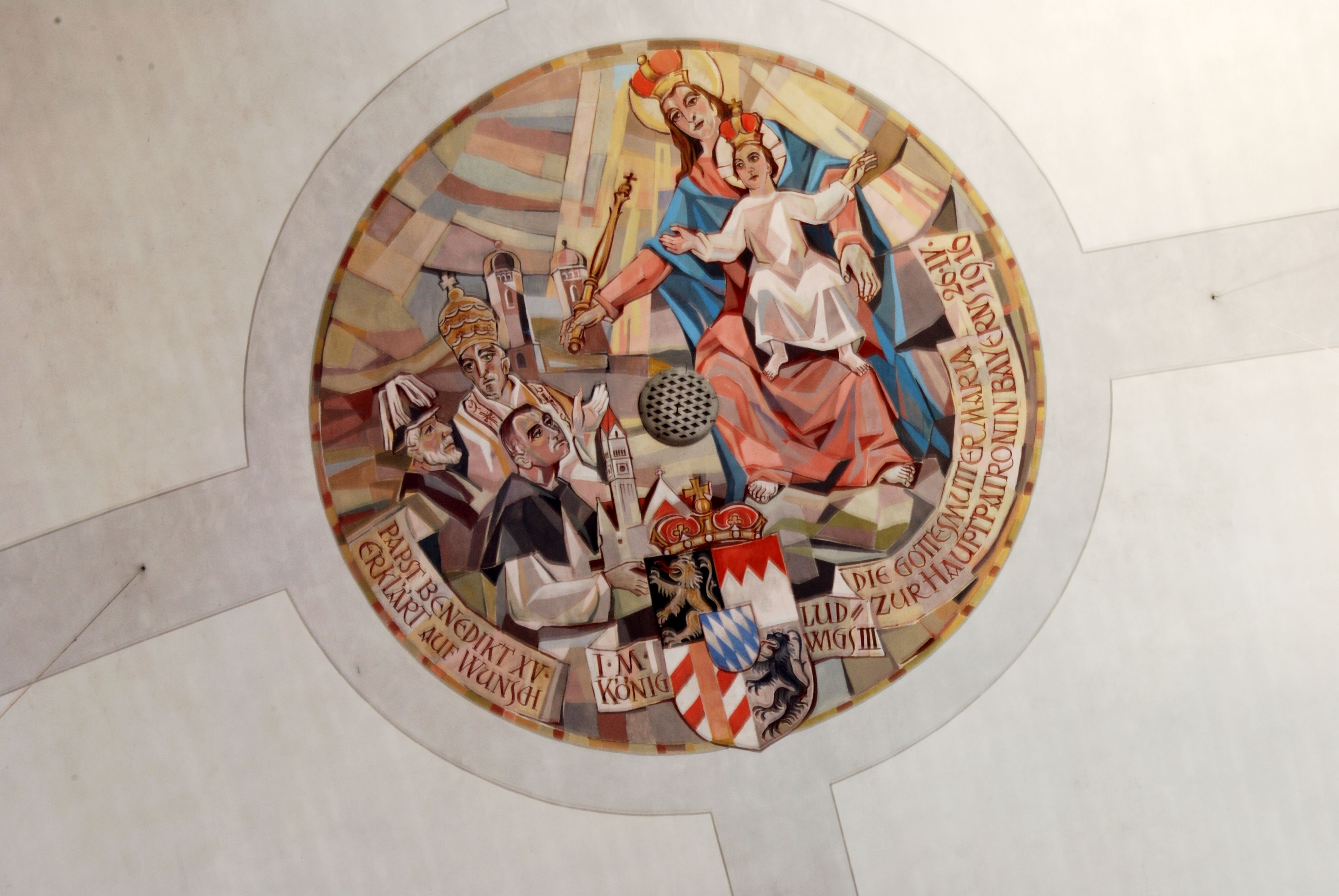 München, Kirche Maria Schutz (Pasing), Rundbild des Chorgewölbes: Stadtpfarrer Dr. Georg Wachinger (1914-1927) bringt die neue Pfarrkirche im Kreis des Papstes Benedikt XV. und König Ludwigs III. dar.